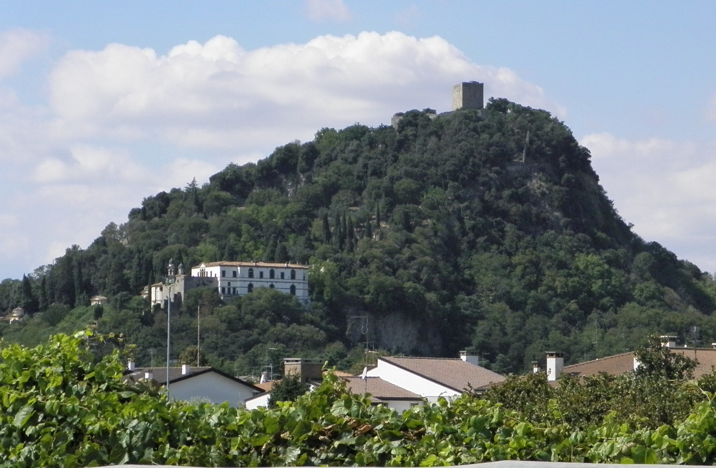 Monte Castello di Monselice, Colli Euganei.